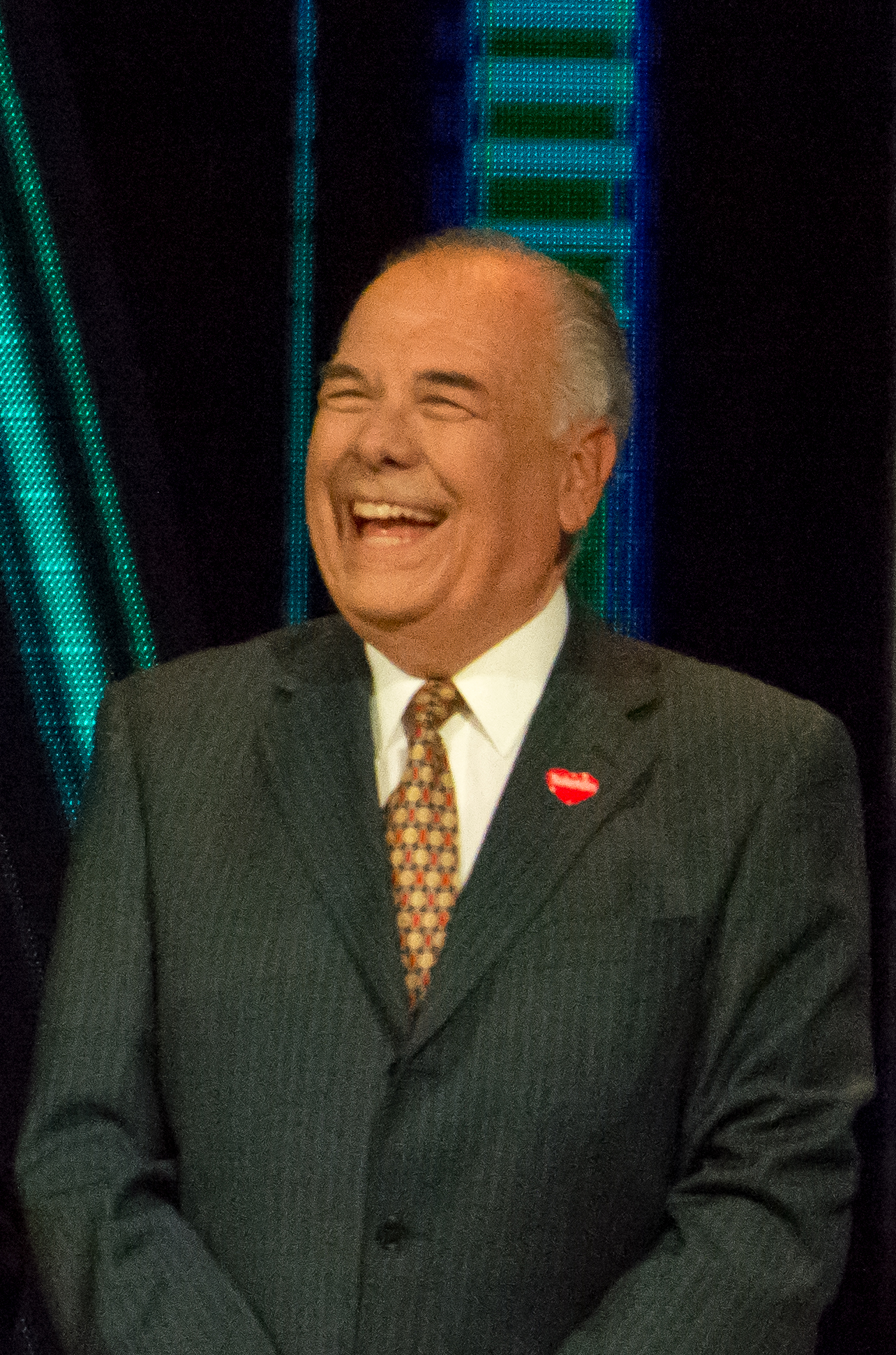 Juan La Rivera, Teletón 2018, Teatro Teletón, Santiago, Chile.